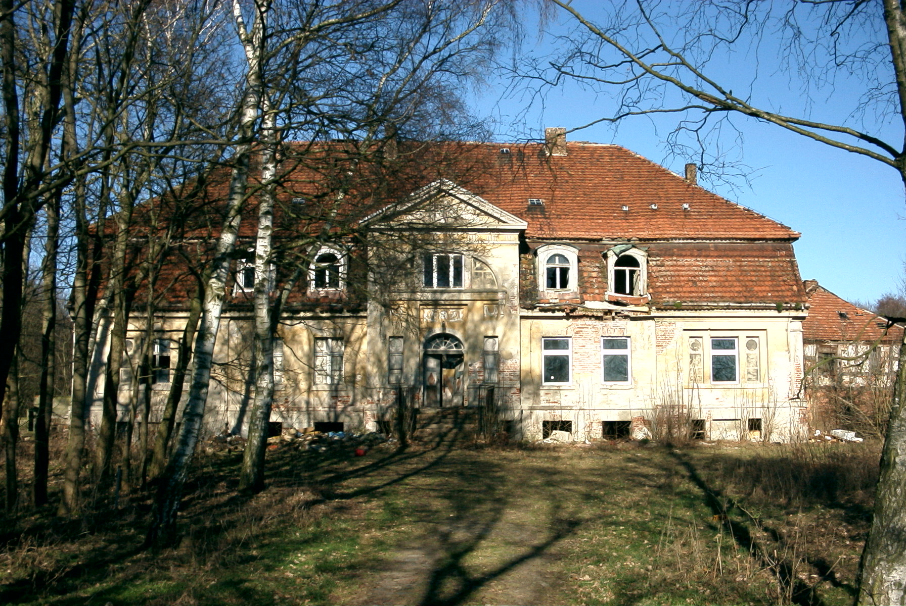 Gutshaus Kuntzow - im Verfall